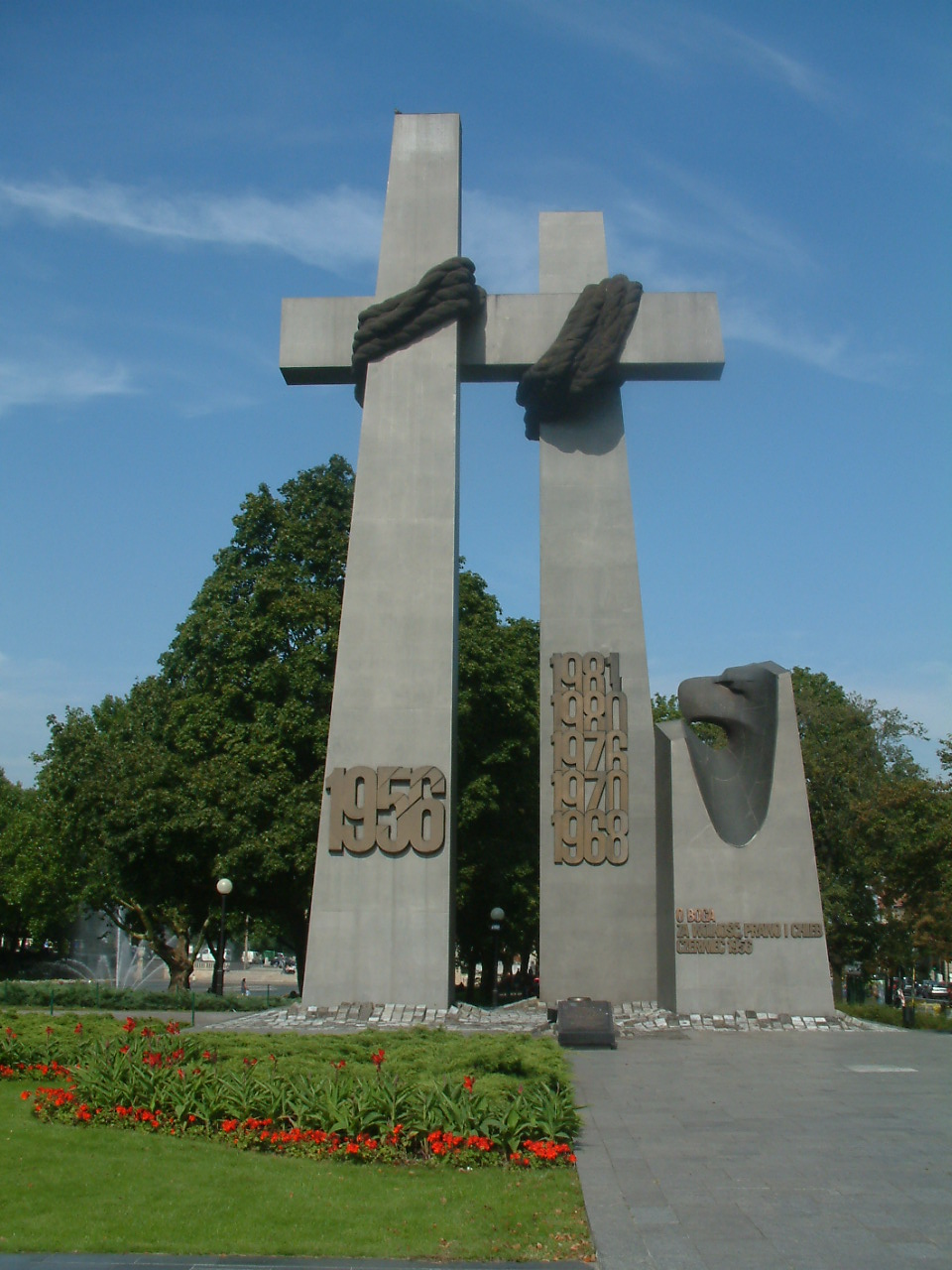 Monument of victimes of Poznański Czerwiec 1956